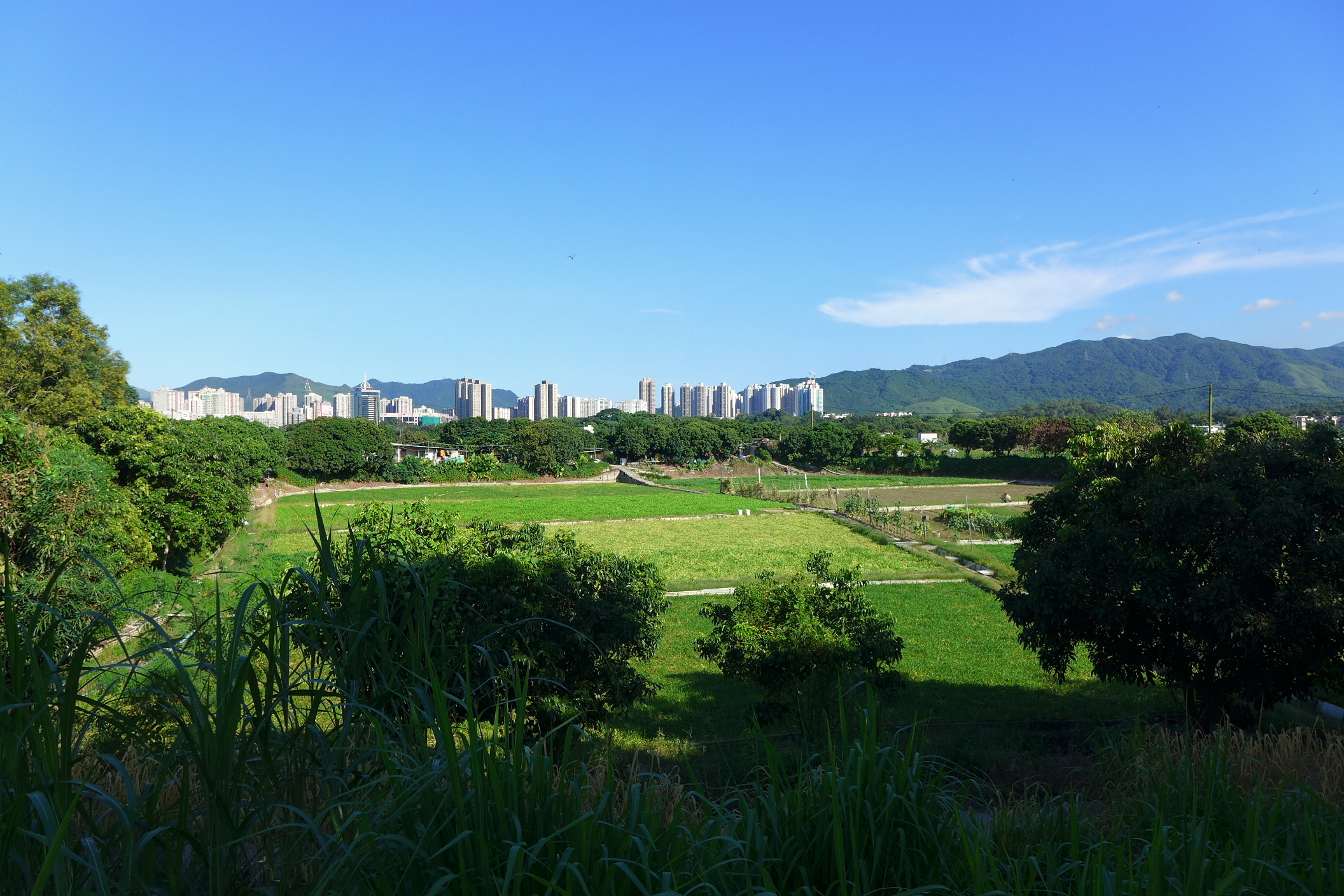 Long Valley